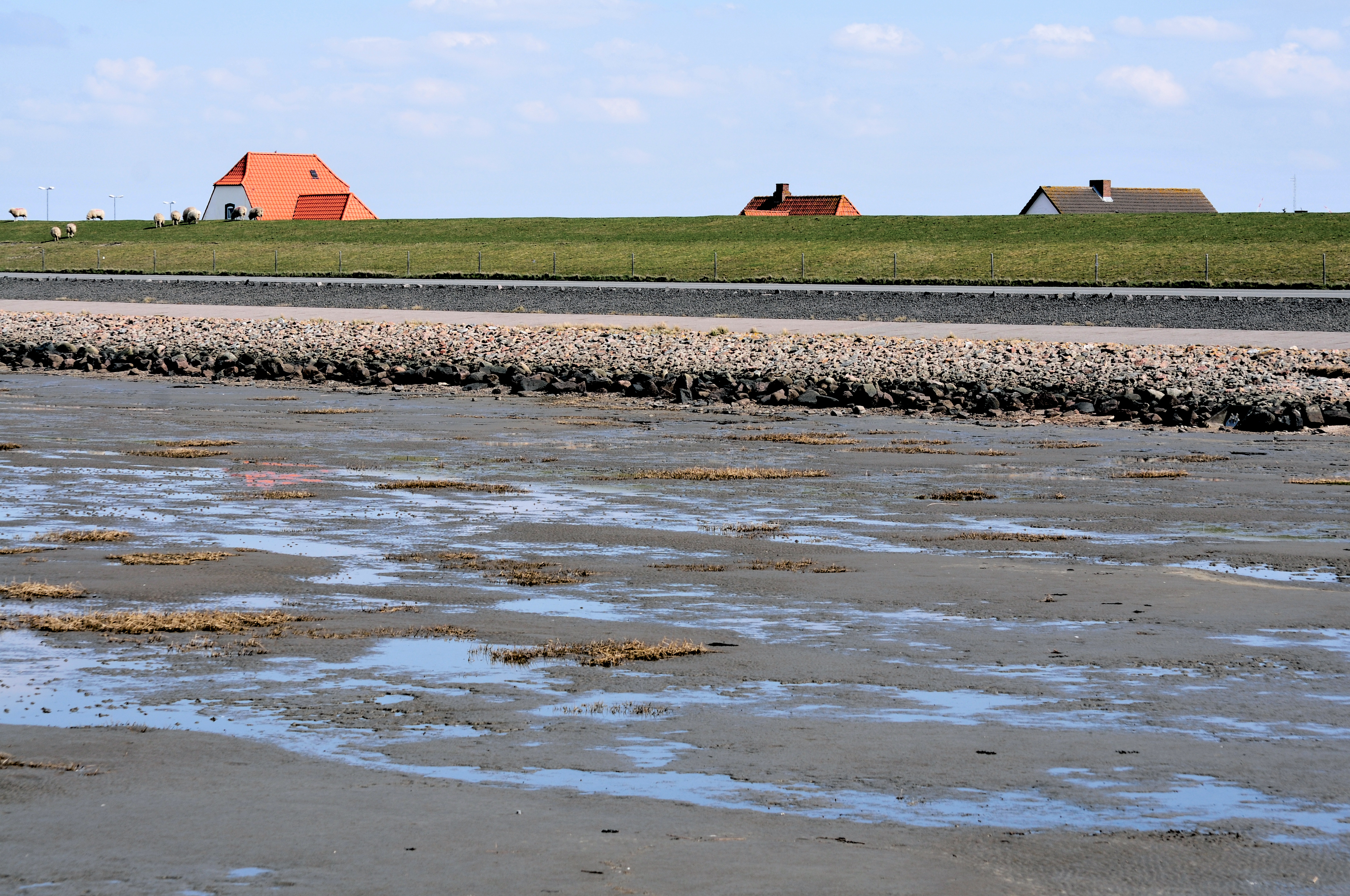 Dagebüll